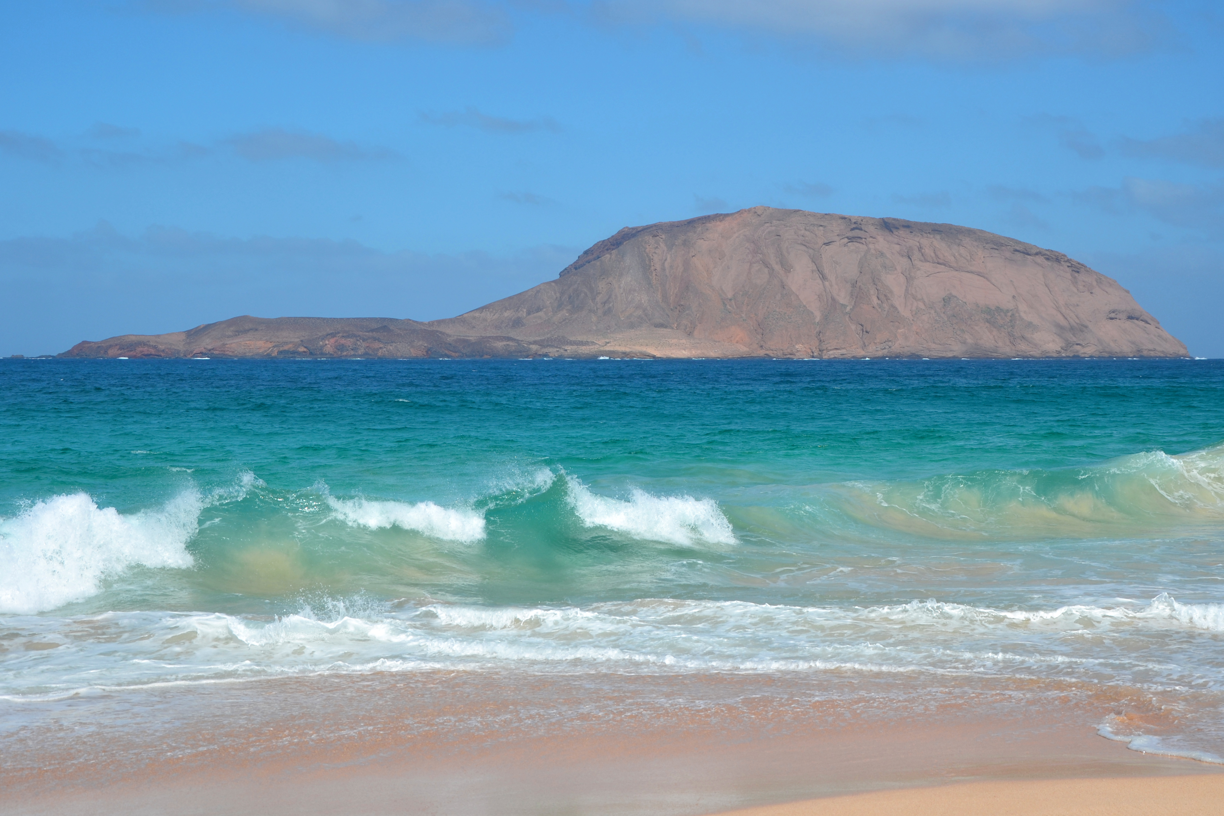 Montaña Clara, Insel nördlich vor Lanzarote, Kanarische Inseln, unbewohnt und unter Naturschutz; von La Graciosa aus gesehen